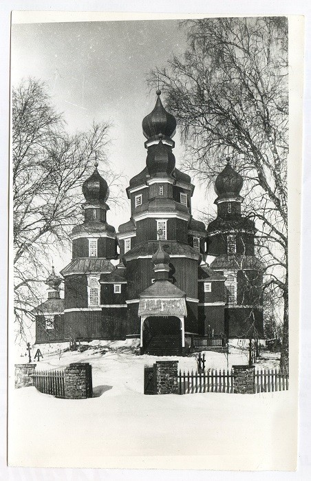 Деревянная Скорбященская церковь в селе Керстово под Петербургом. 1748 г. Выстроена духовником императрицы Федором Дубянским. Снесена в советское время.